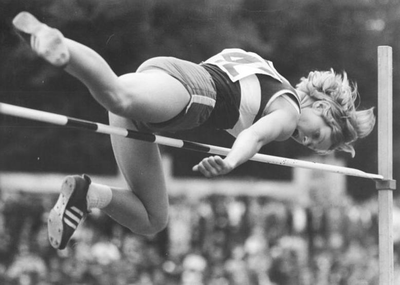 Rita Schmidt Zentralbild Kutscher 5.7.70-str-Erfurt: XXI. DDR-Leichtathletik-Meisterschaften vom 3.-5.7.70 - 3. Tag. Wieder einmal allen Konkurrentinnen überlegen zeigte sich Rita Schmidt (SC DHfK Leipzig) , der 1,80 m zum erneuten Meistertitel reichten.